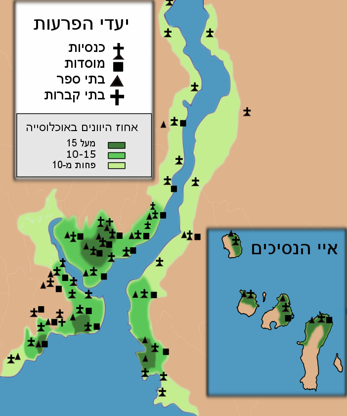 septembriana 1955